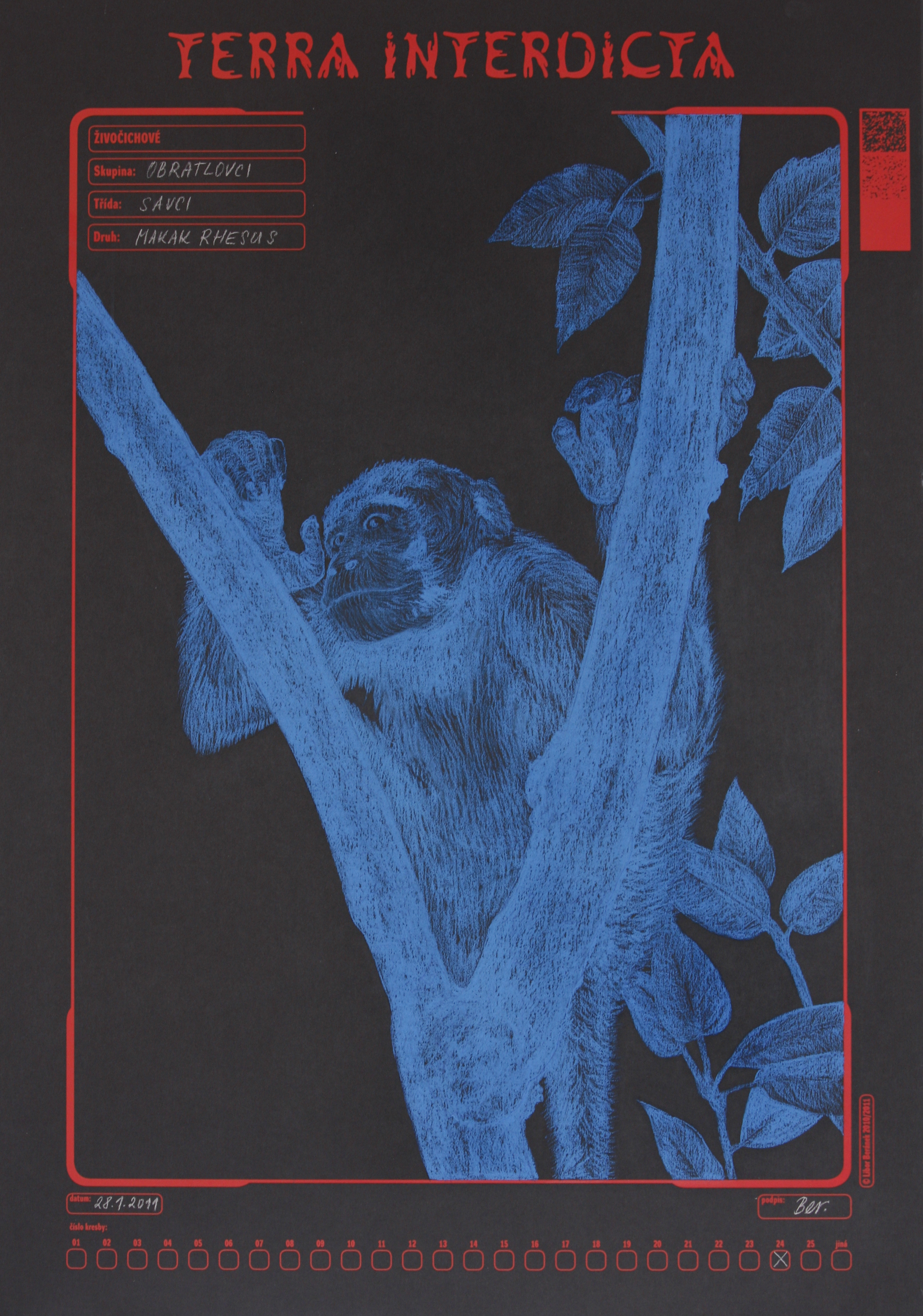 kresba